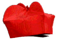 Kardinalsbirett bearbeitet als gif von Th1979